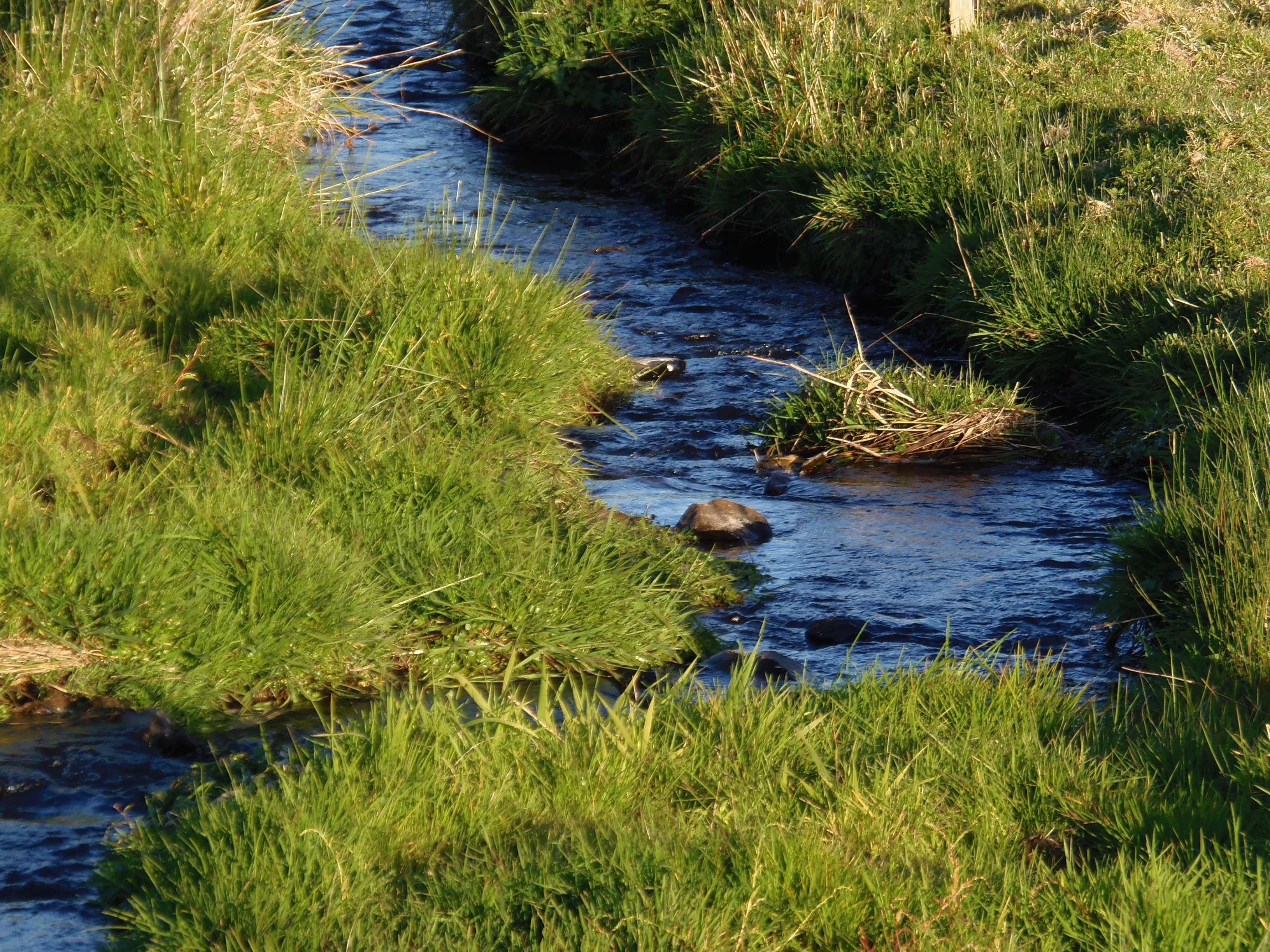 Truttemer-le-Grand (Normandie, France). La Diane à la Rocherie.